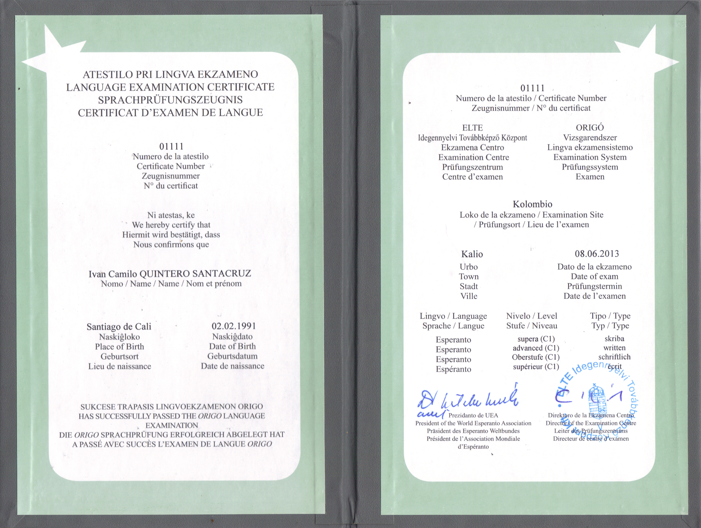 Certificado de éxito en un examen de Esperanto bajo el marco común europeo de referencia para las lenguas. Nivel C1.